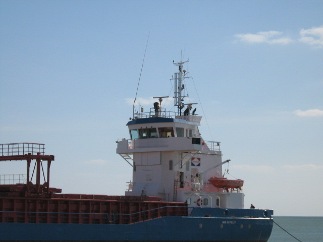 antennes de navire de commerce pour la Zone A1 SMDSM.